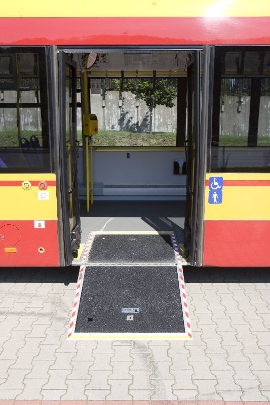 Urbino 12